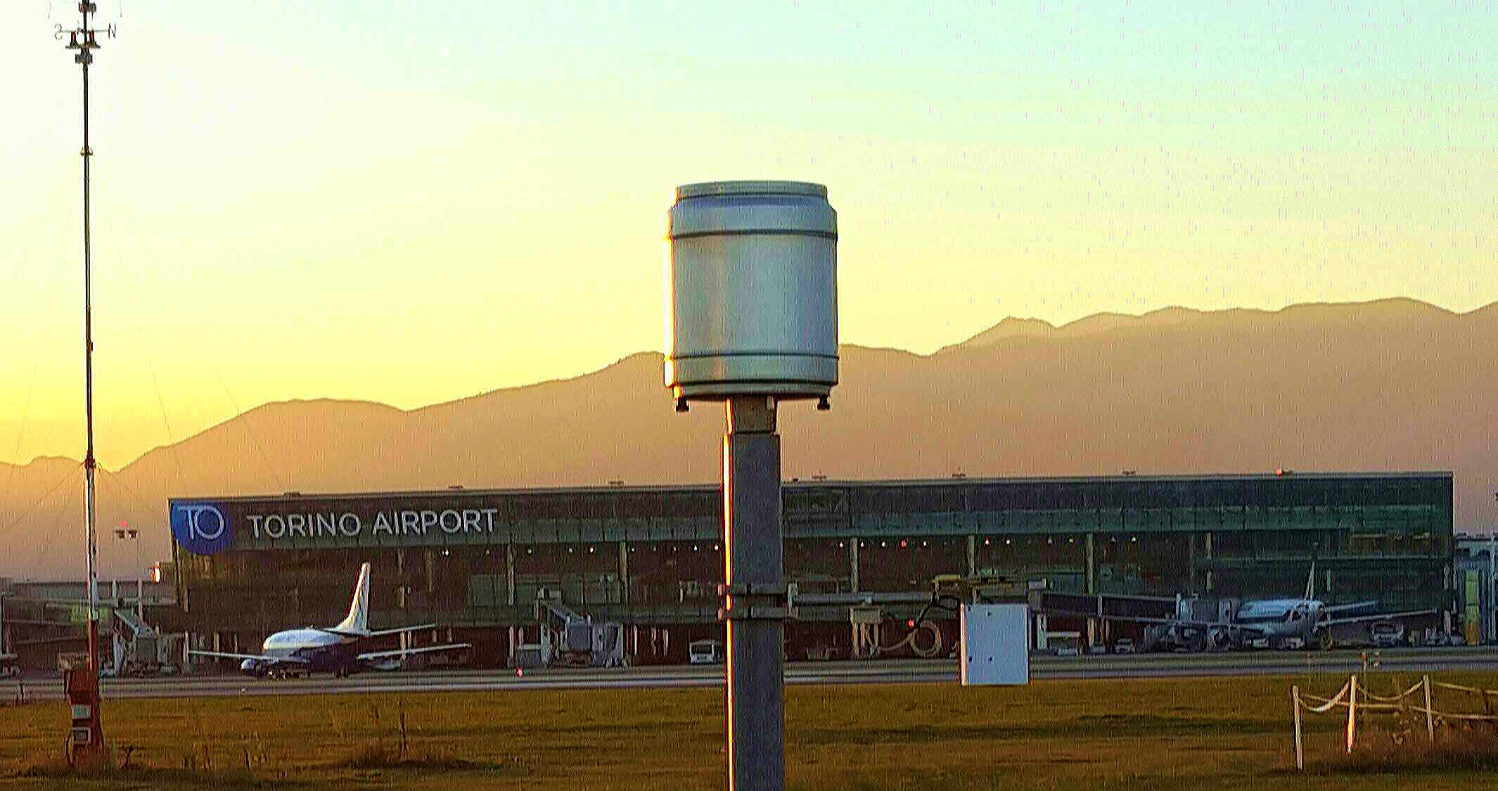 Aeroporto di Torino-Caselle, con il nuovo logo 2015.